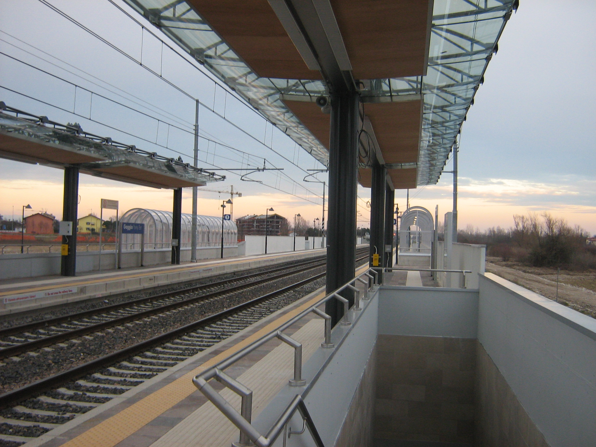 gaggio porta est